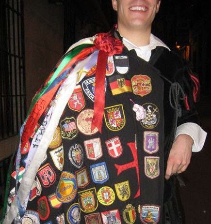 Détail du costume de tuno.